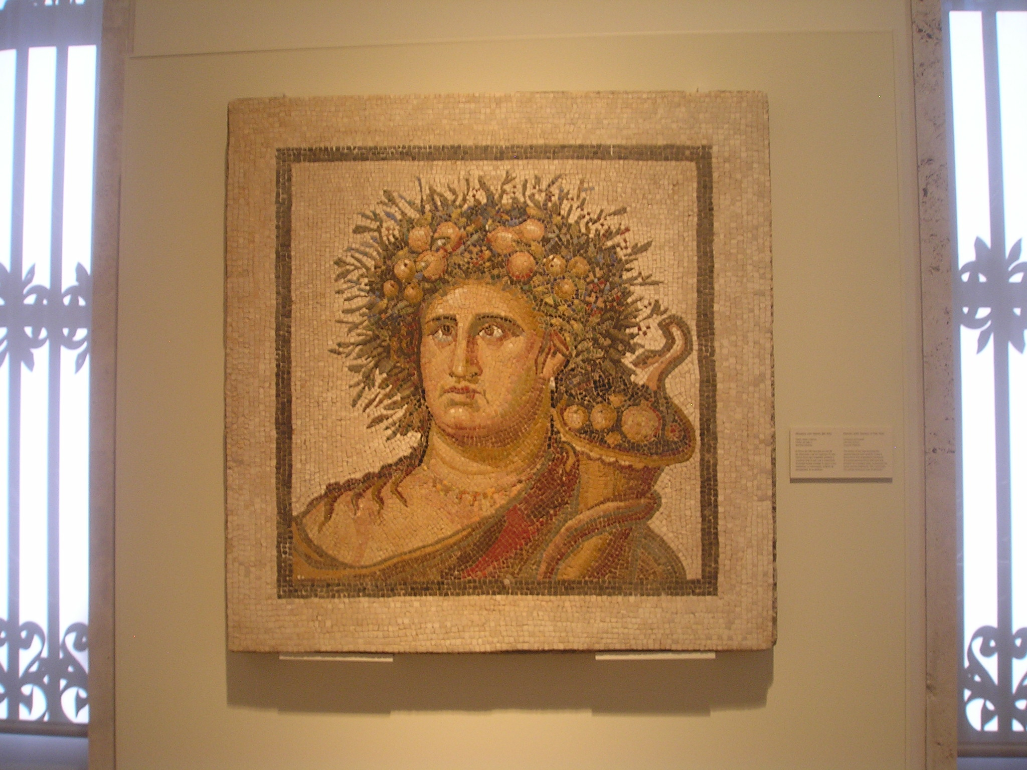 Mosaico romano de finales del siglo II depositado en el Museo Arqueológico Nacional en Madrid (España), procedente de la vega de Aranjuez (Madrid, España) en el que se representa un busto de varón con túnica con una cornucopia y con los cabellos cubiertos con frutos.